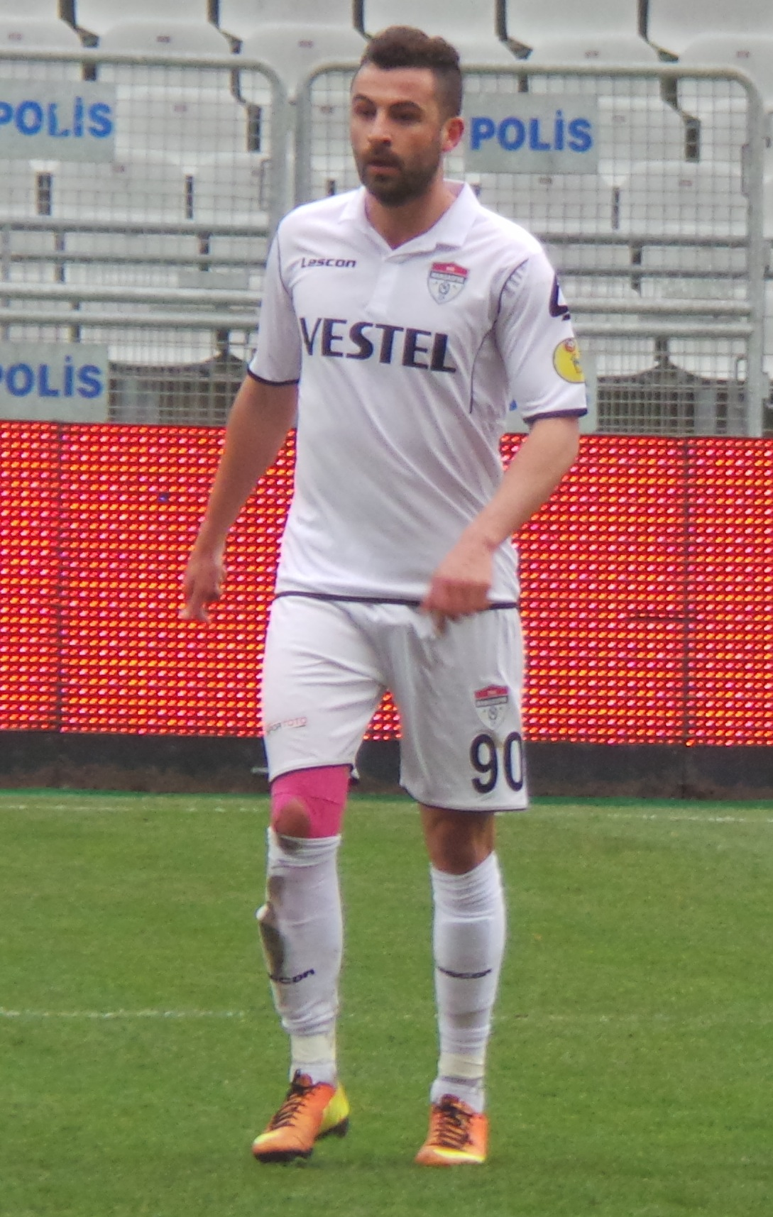 Abdulkadir Özgen